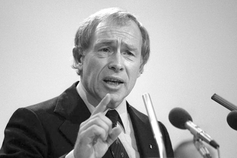 26. Bundesparteitag der CDU in der Friedrich-Ebert-Halle in Ludwigshafen 23.-25.10.1978